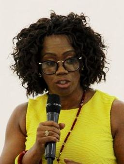 Epsy Campbell durante su presentación como candidata a la vicepresidencia de la República para las elecciones del 2018.